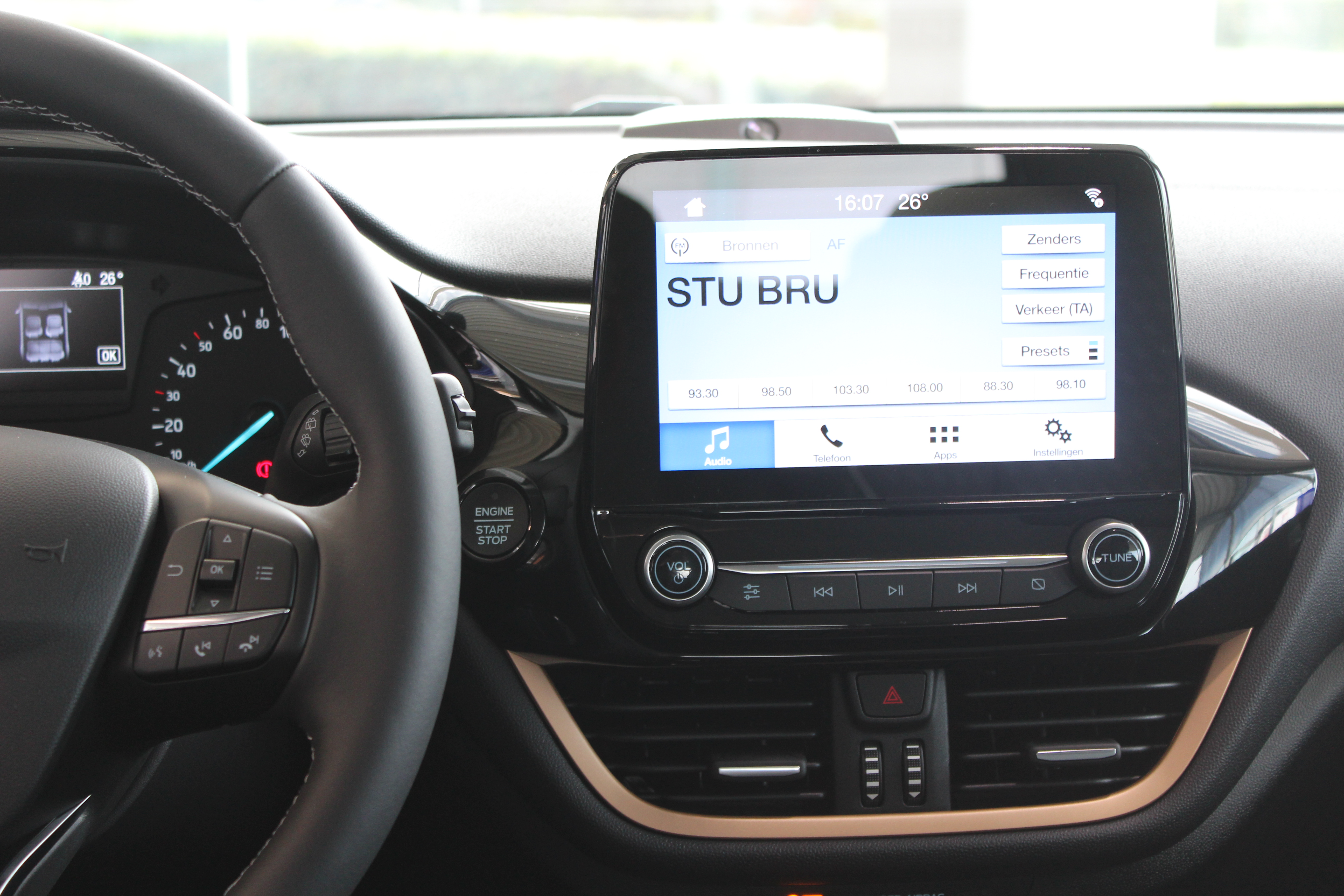 SYNC 3 systeem in 7e generatie Fiesta